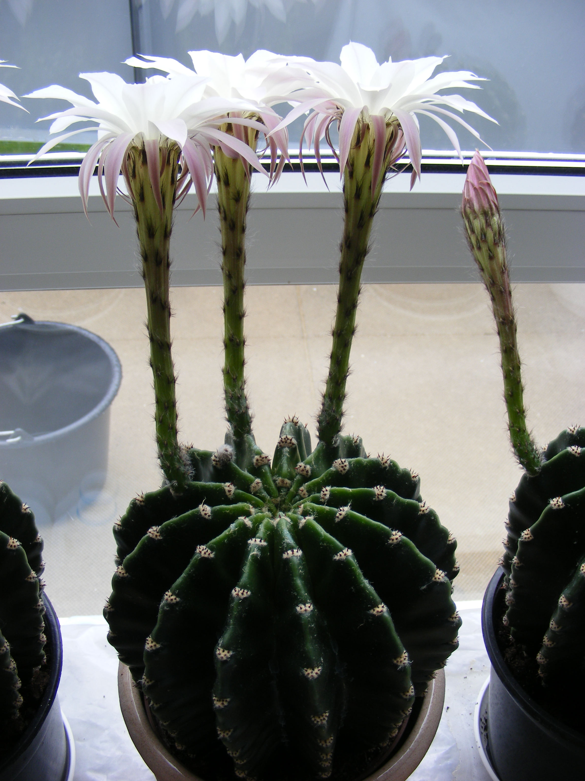 Echinopsis eyriesii, 30-05-2010, locatie:huis van familie